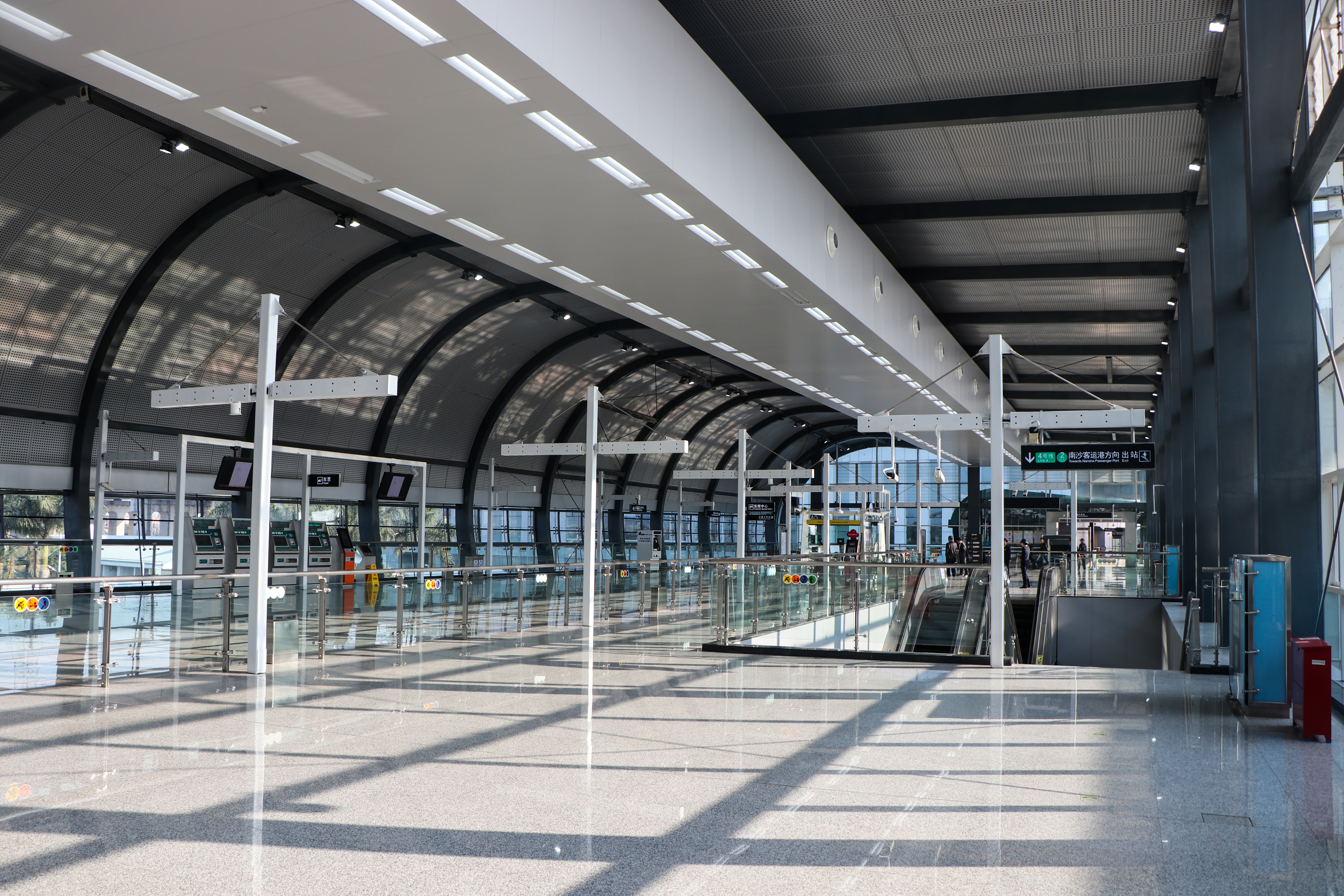 广州地铁庆盛站